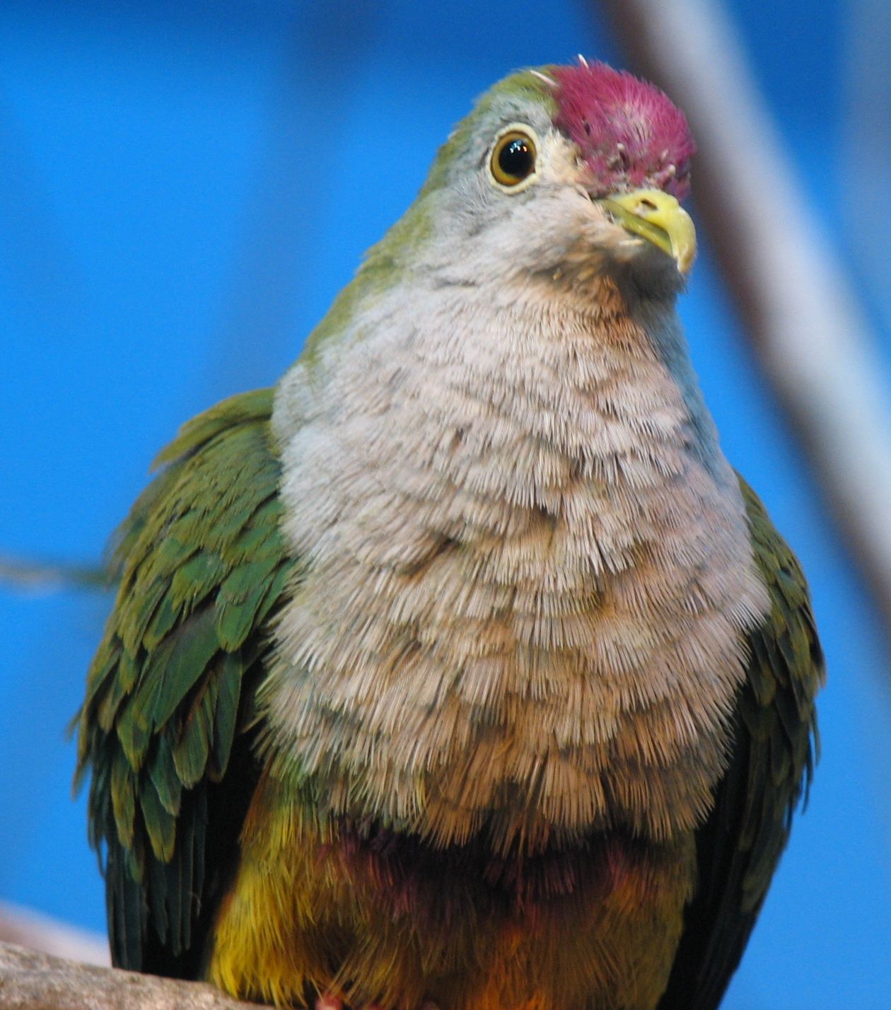 Beautiful Fruit Dove (Ptilinopus pulchellus)